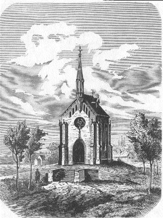 Zichy Ödön emlékkápolna Lóréven. This is a photo of a monument in Hungary. Identifier: 7115